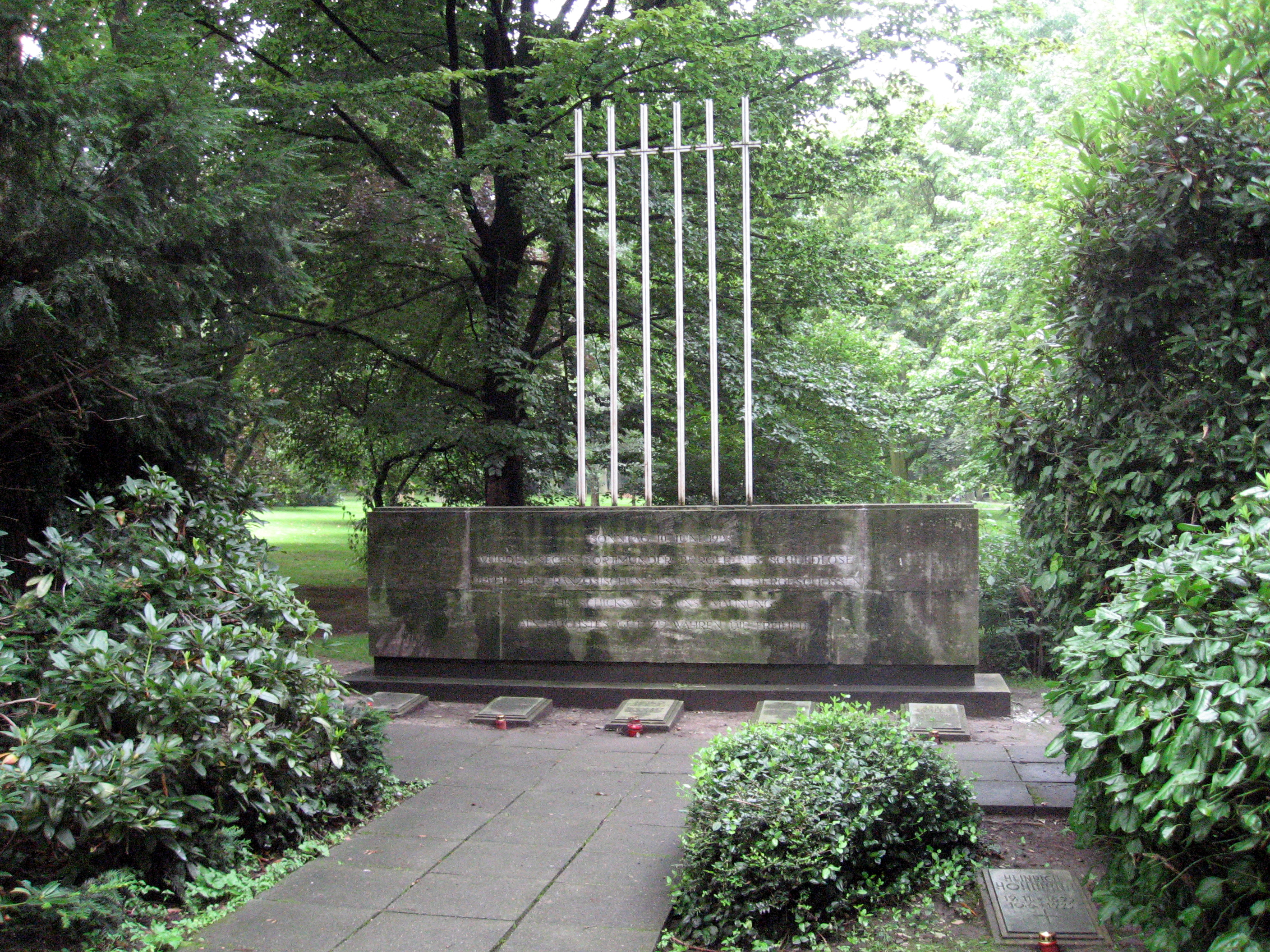 Dortmund, westliche Innenstadt, Westpark, Denkmal für erschossene deutsche Geiseln während der Ruhrbesetzung Inschrift: „SONNTAG 10. JUNI 1923 WURDEN SECHS DORTMUNDER BÜRGER ALS SCHULDLOSE OPFER DER FRANZÖSISCHEN BESATZUNG NIEDERGESCHOSSEN IHR SCHICKSAL IST UNS MAHNUNG ALS HÖCHSTES GUT ZU WAHREN DIE FREIHEIT“